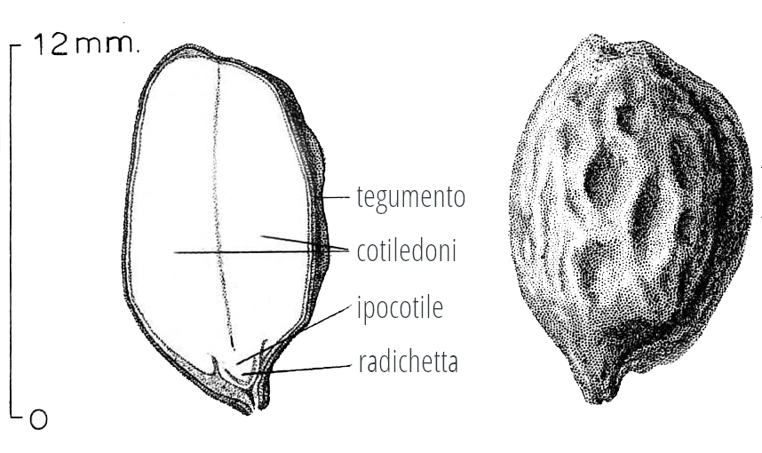 schema in italiano di un seme di Jojoba su disegno in pubblico dominio